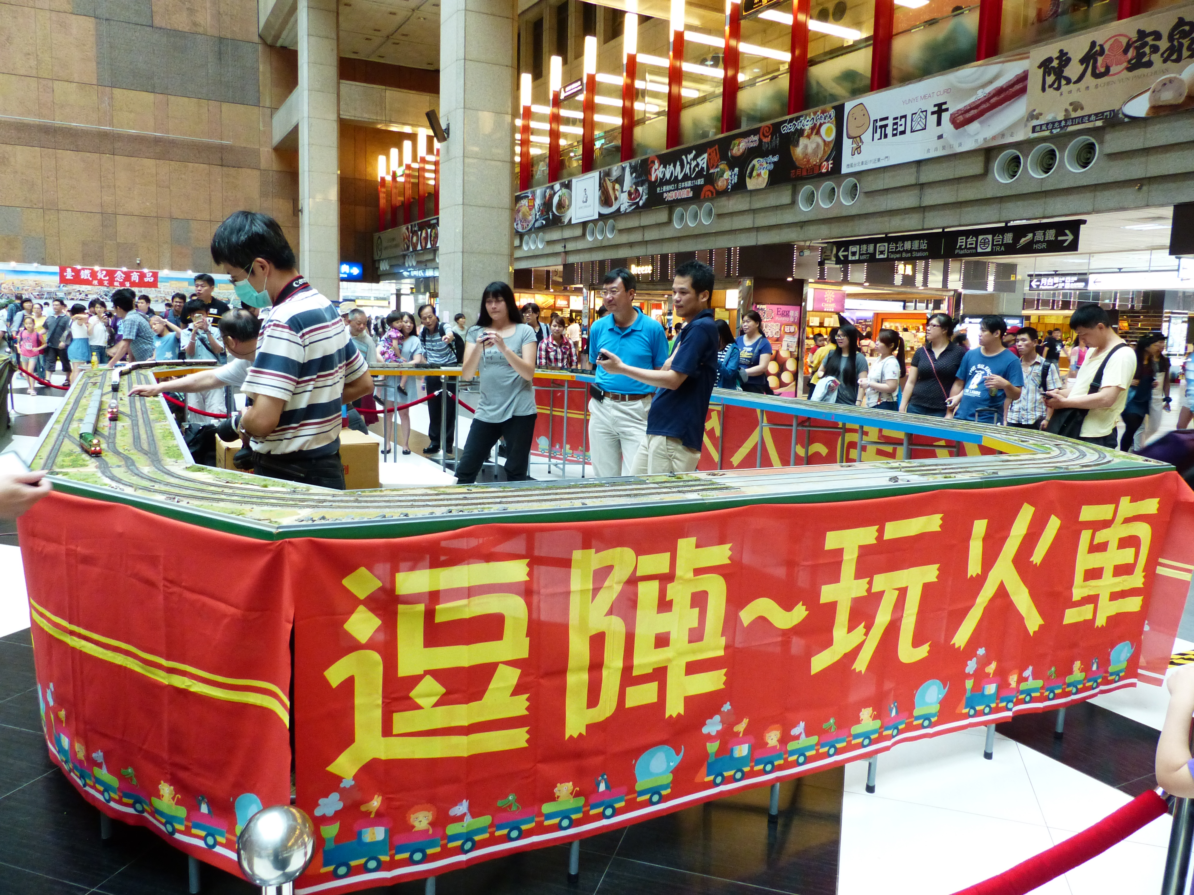 XN鐵道模型俱樂部臺北車站運轉會。